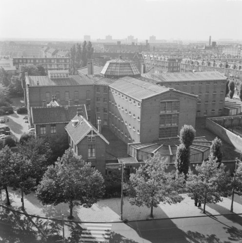 Huis van Bewaring aan de Amstelveenseweg te Amsterdam